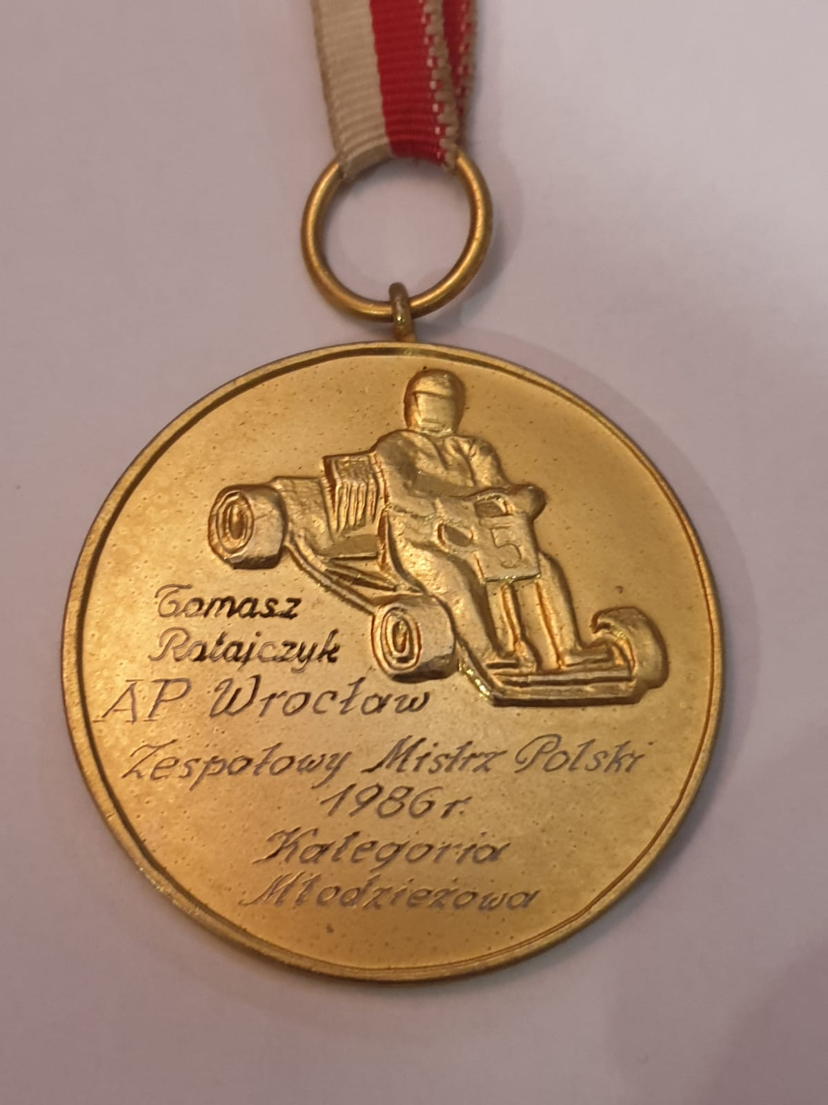 Medal